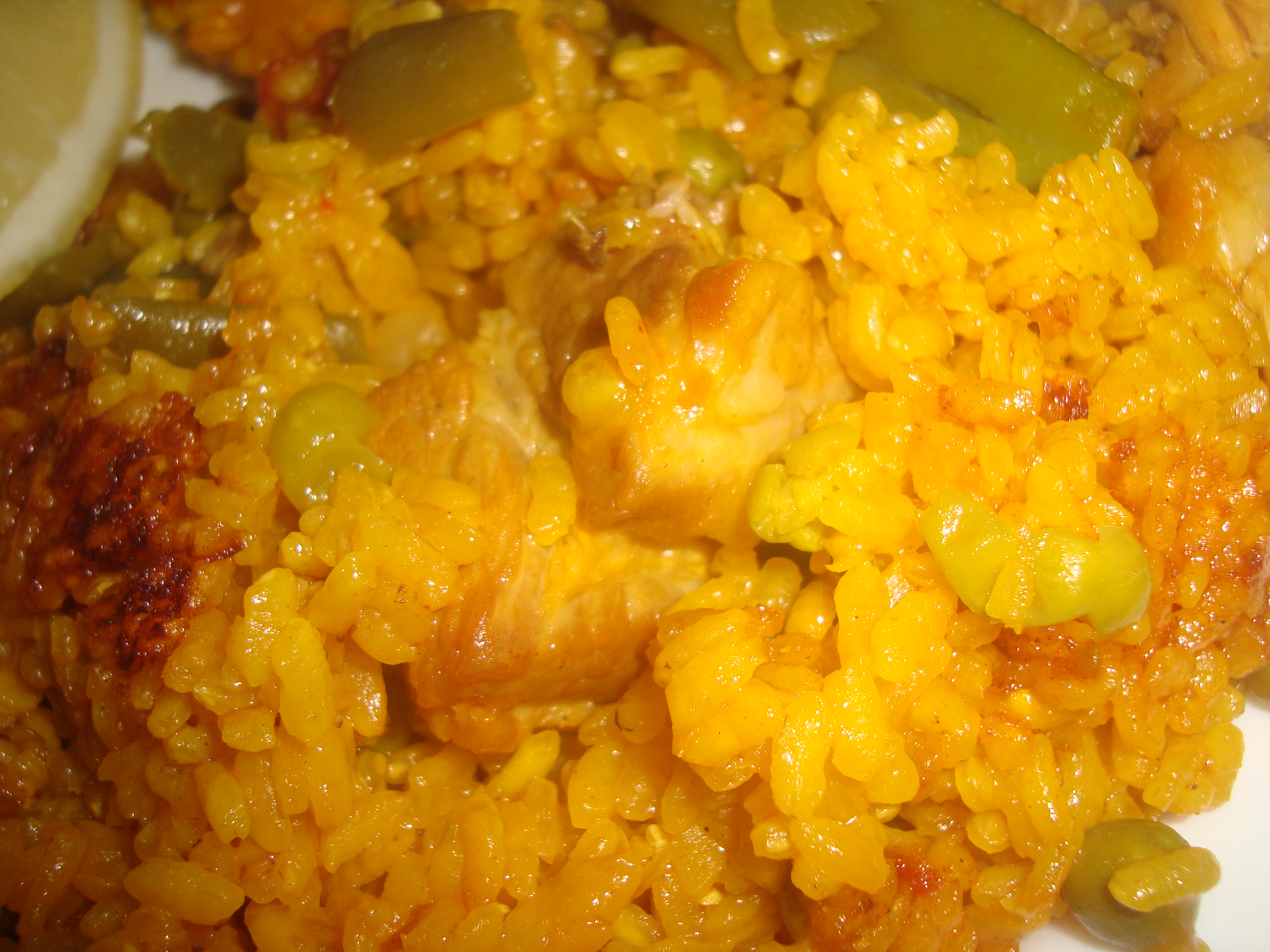 Plato de arróz de paella valenciana